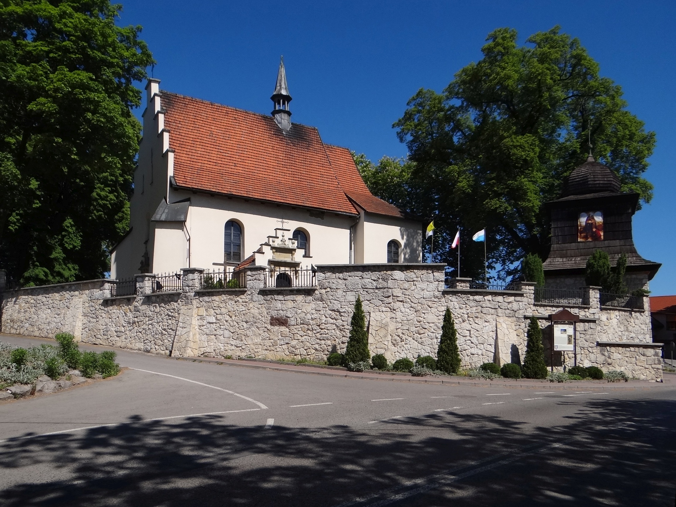 Kościół w Giebułtowie